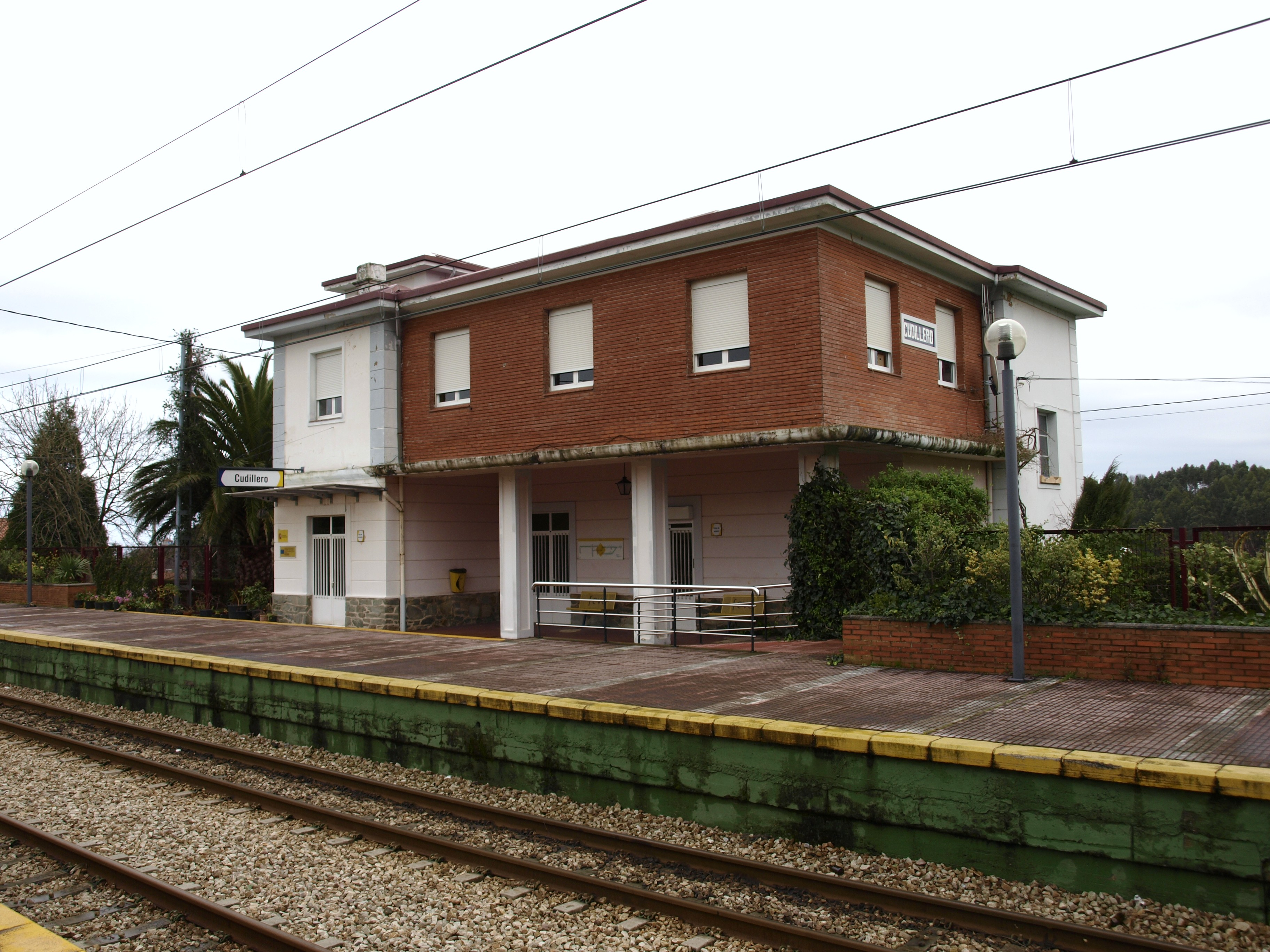 Estación Feve Cudillero